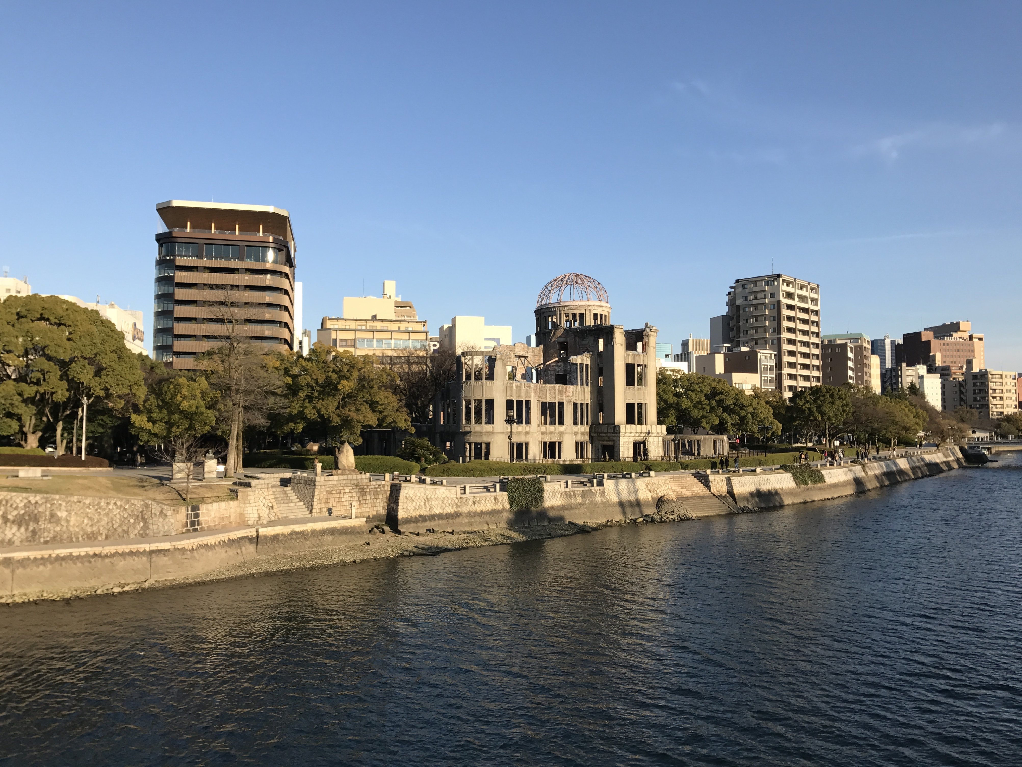 相生橋より望む元安川と原爆ドーム